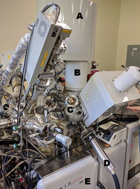 Machine XPS avec certaines composantes